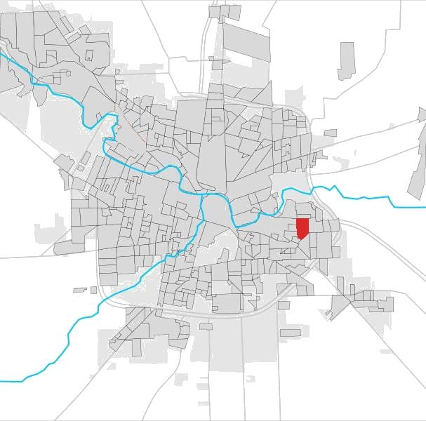 Localización en rojo sobre el Barrio Altamira